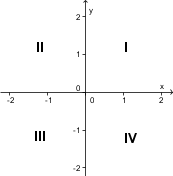 Kvadrantu izvietojums